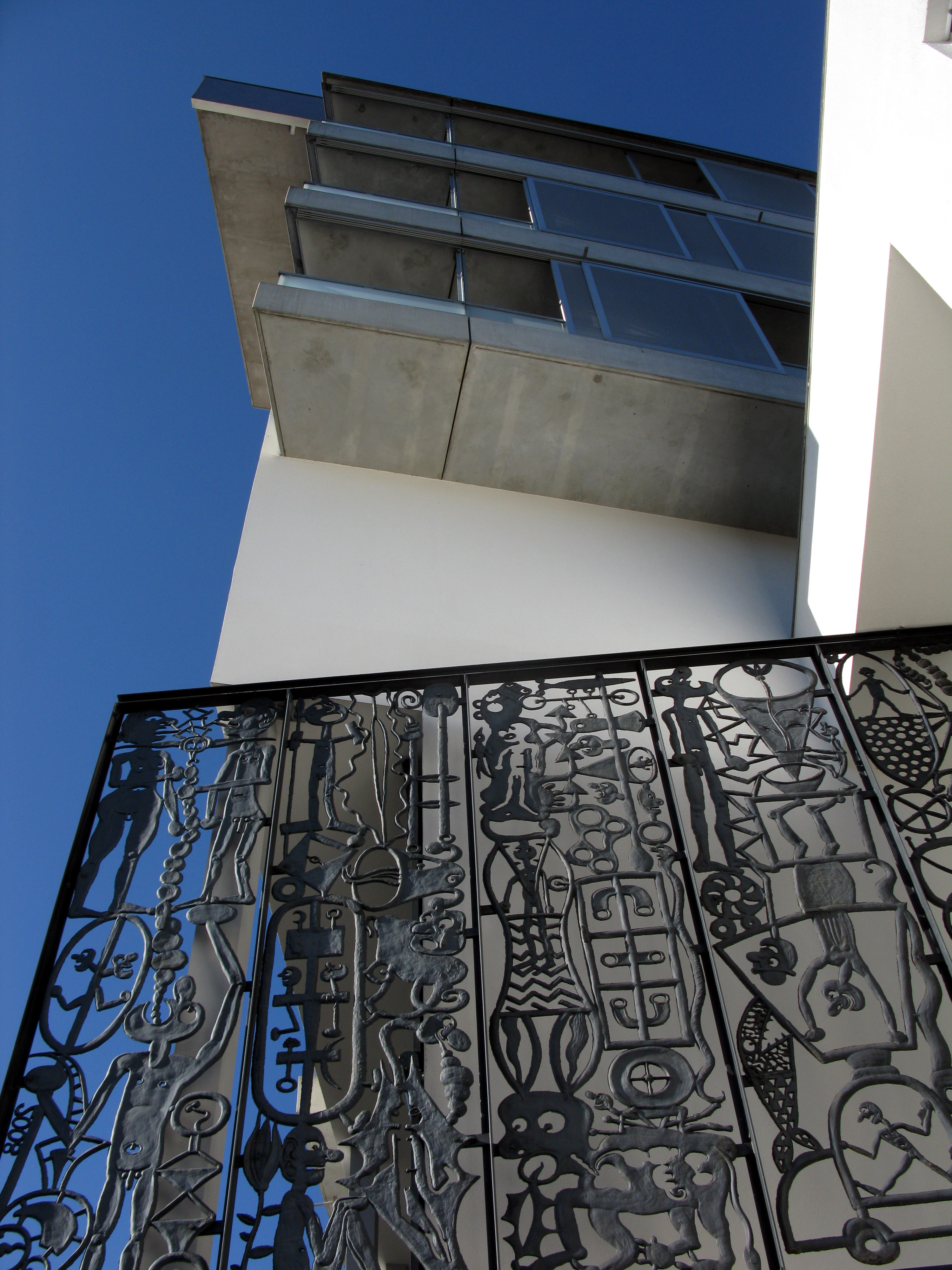 Tramturm mit Relief "ohne Titel", 2008 von Frieder Heinze in Freiburg-Rieselfeld